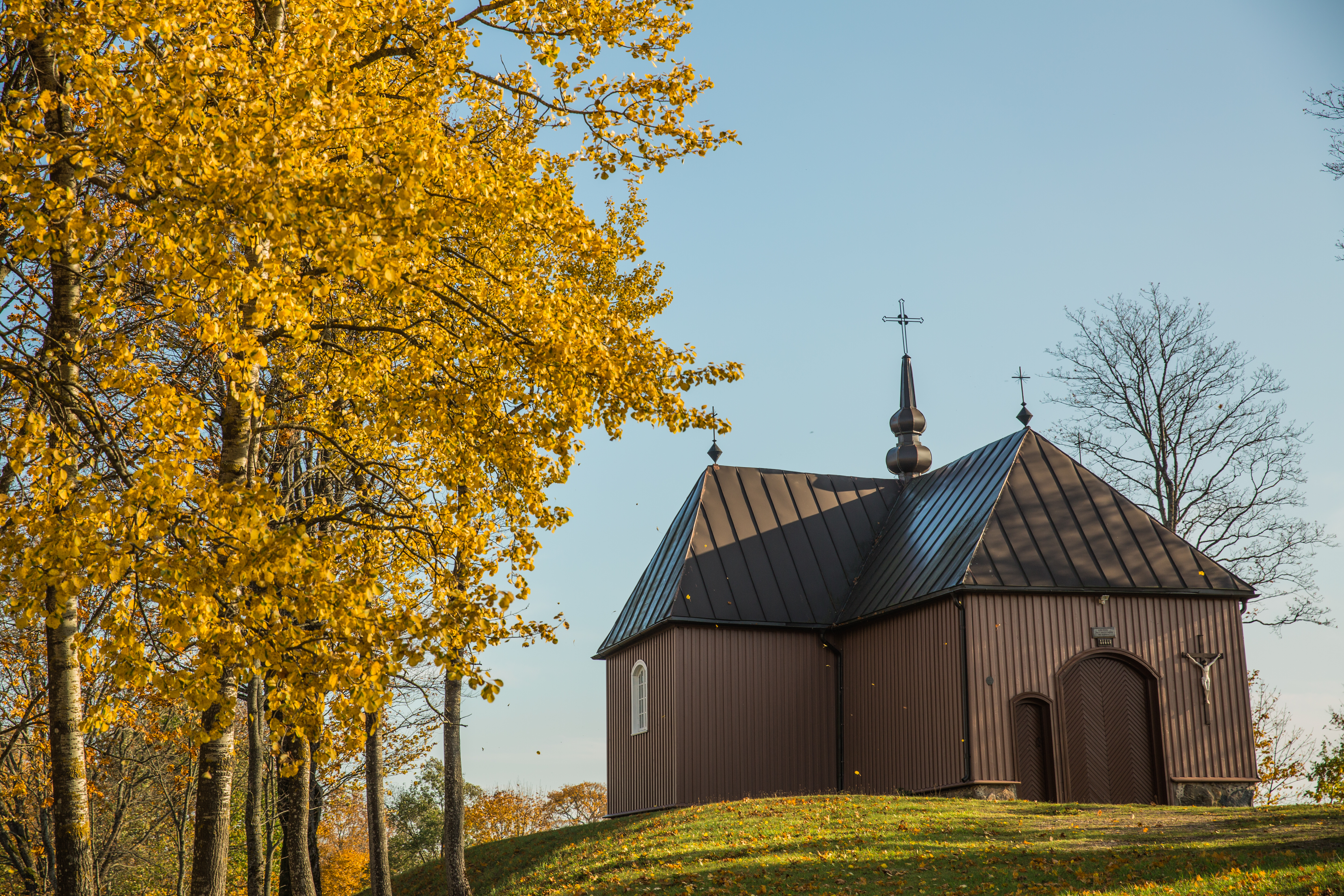 Žemaičių Kalvarijos kryžiaus kelio koplyčios